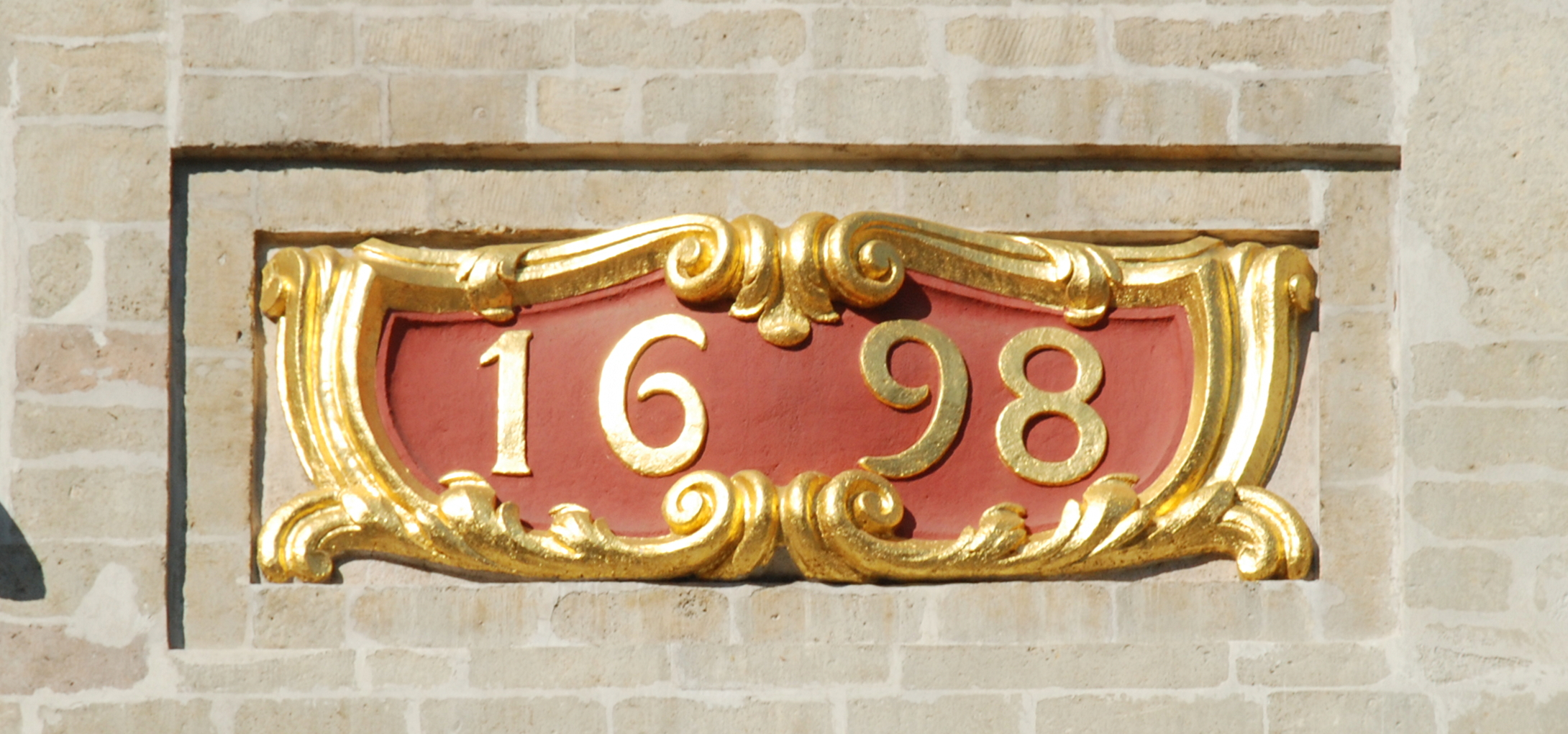 Belgique - Bruxelles - Grand-Place - Maison du Cygne